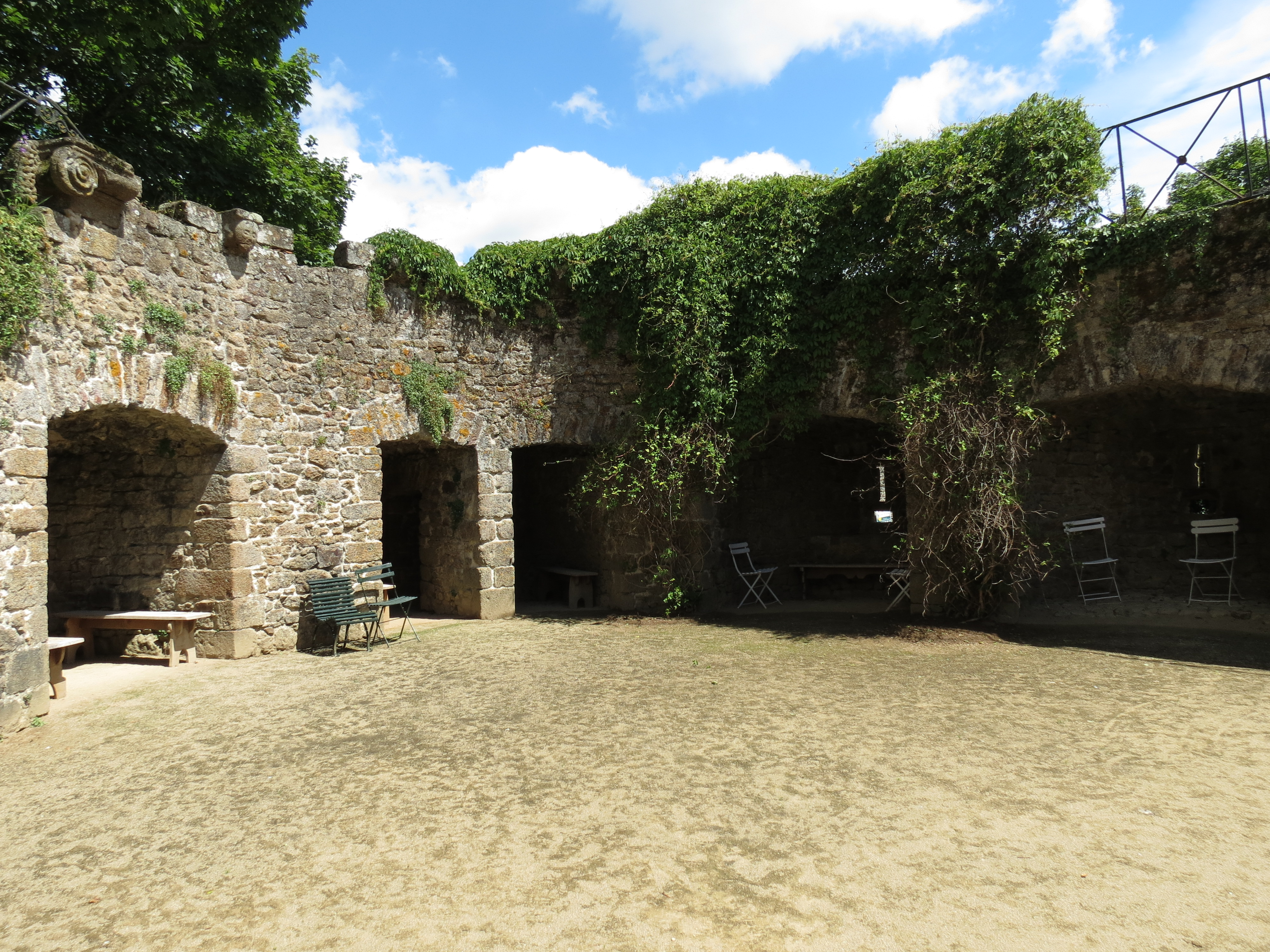 Château de Lassay, dans la Mayenne, Pays de la Loire. Object location48° 26′ 20″ N, 0° 30′ 00″ W